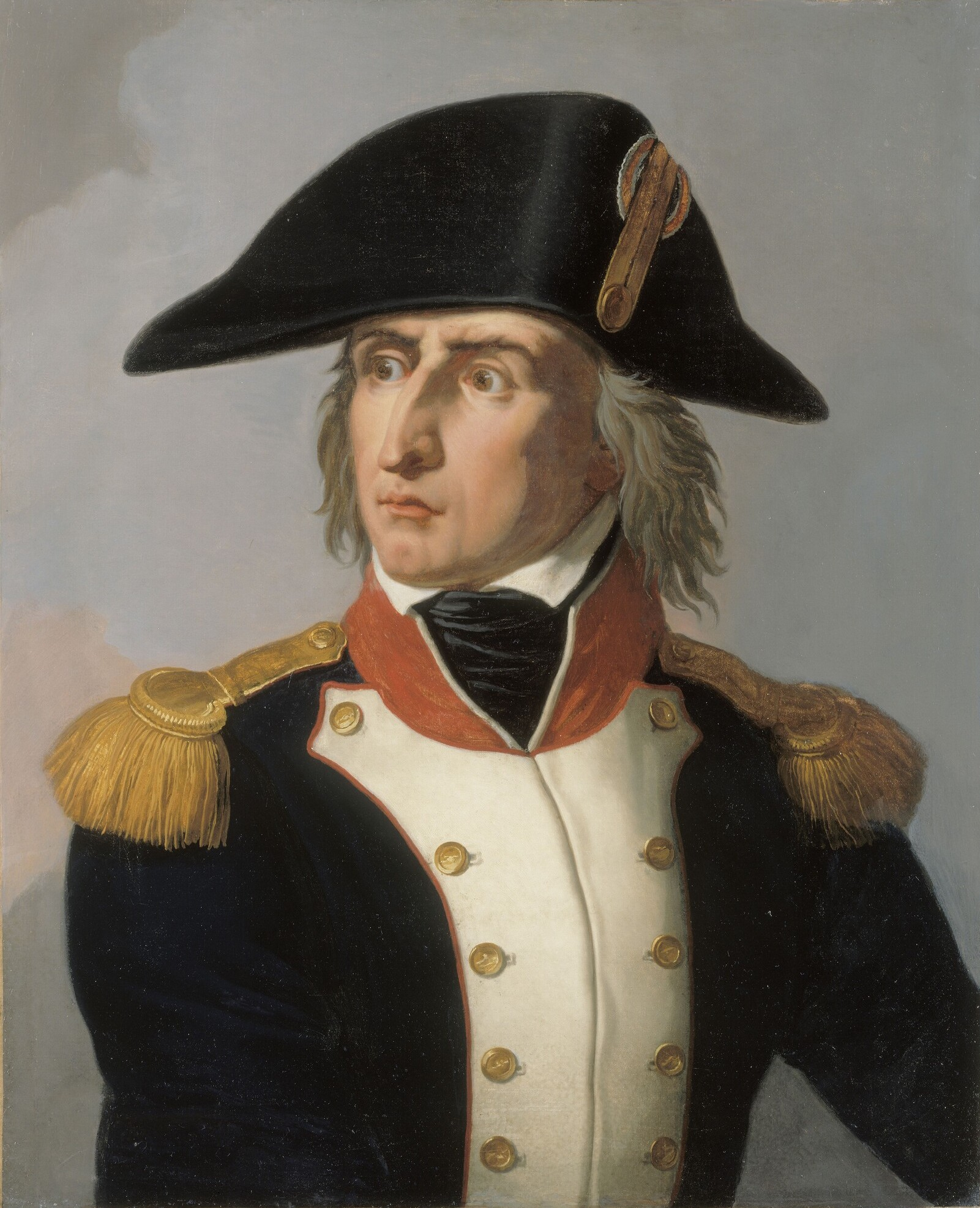 Commandé par Louis-Philippe pour le musée historique de Versailles en 1835